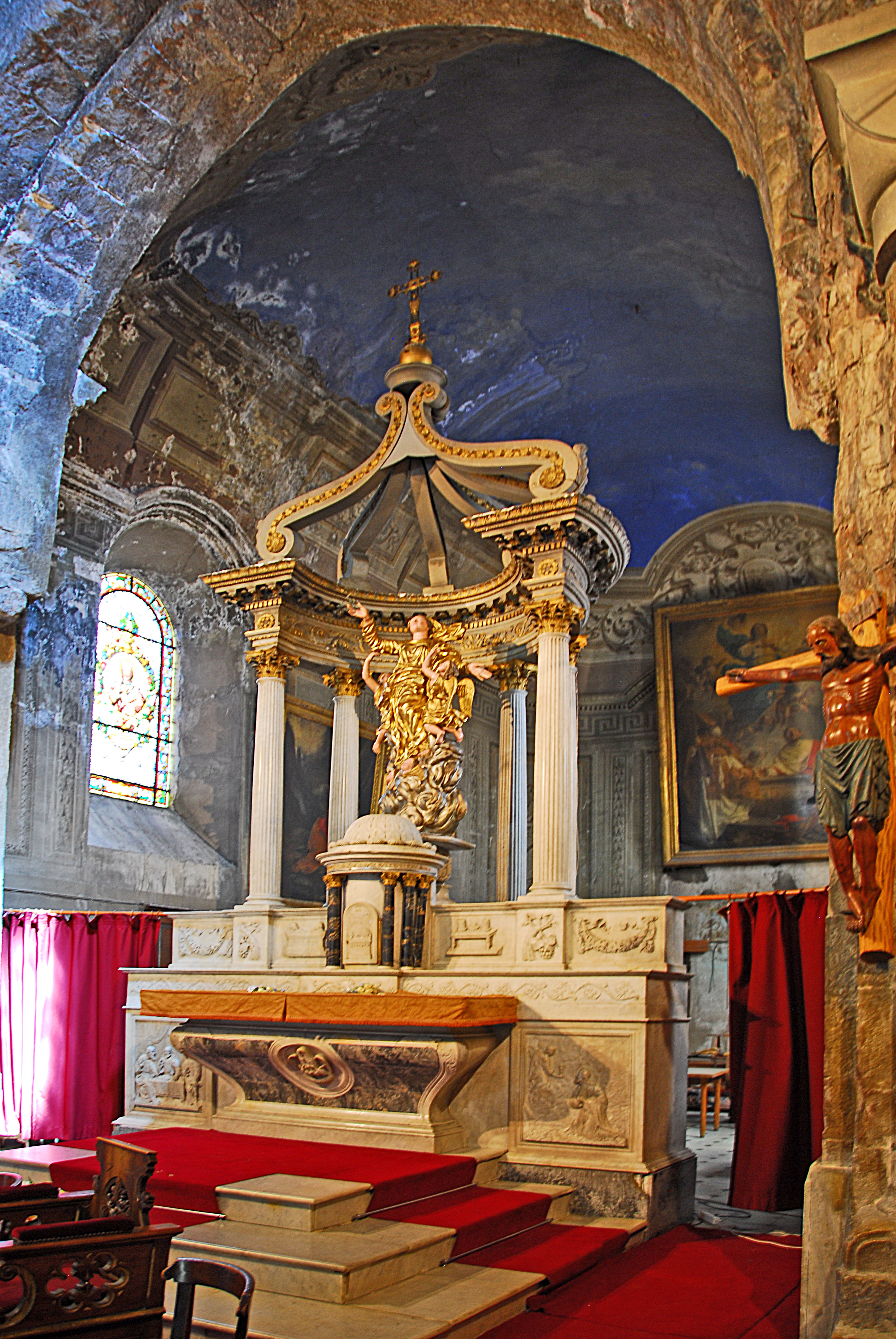 Kathedrale Notre-Dame-du-Puy von Grasse, Chor mit Hauptaltar